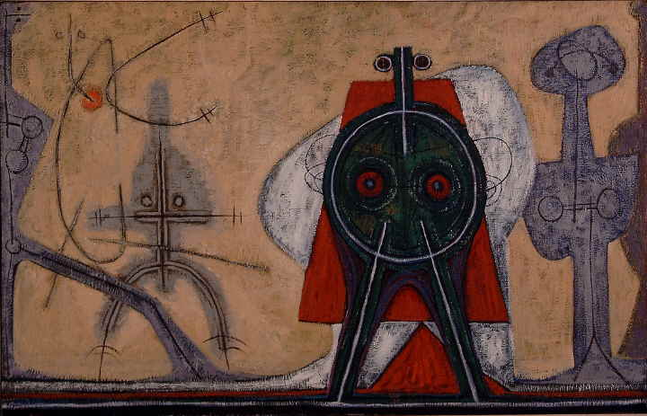 Der Rote Kardinal - Öl auf - Dekorationsstoff 105 x 165